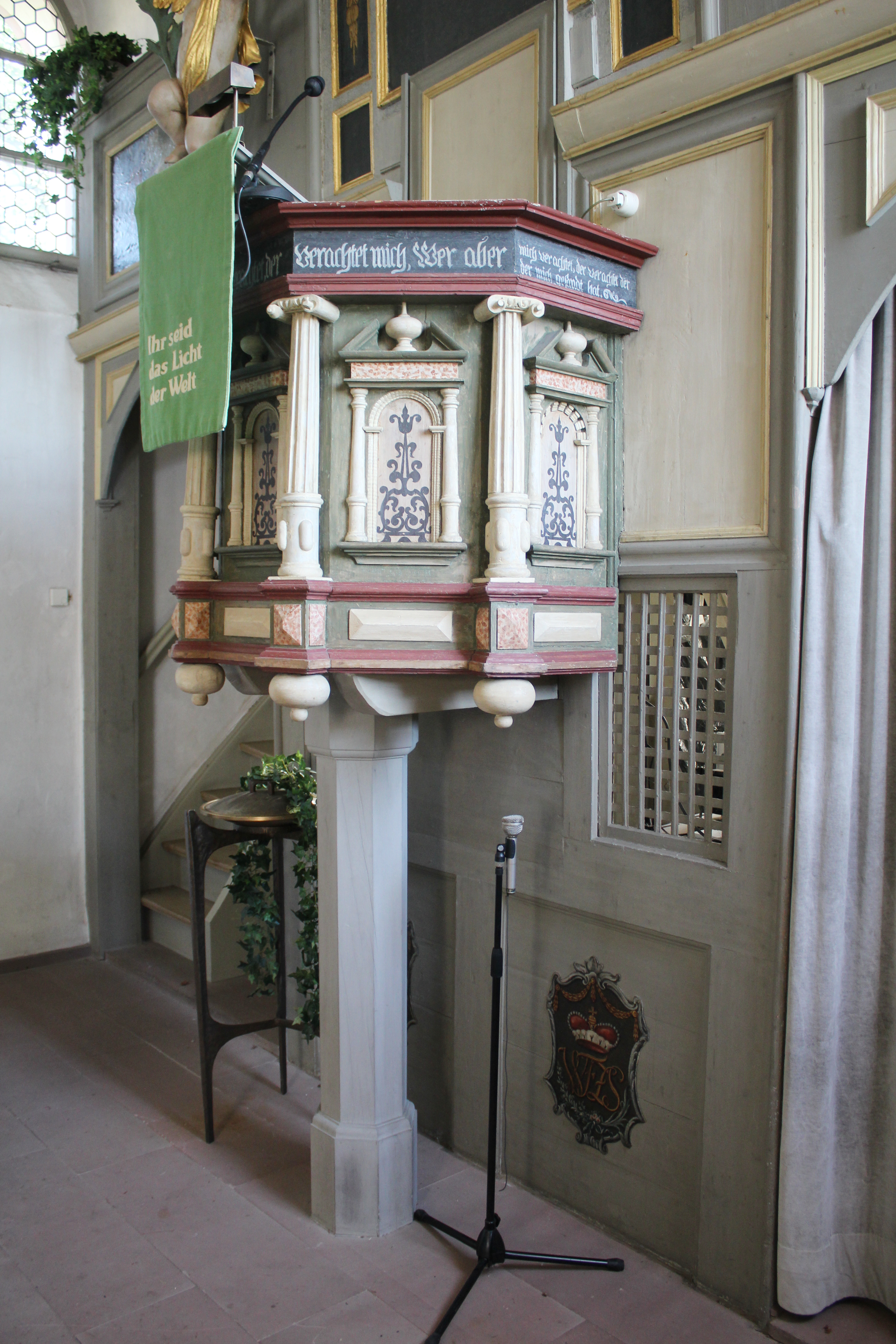 Ev. Kirche Oberbiel, Solms, Lahn-Dill-Kreis, Hessen, Deutschland